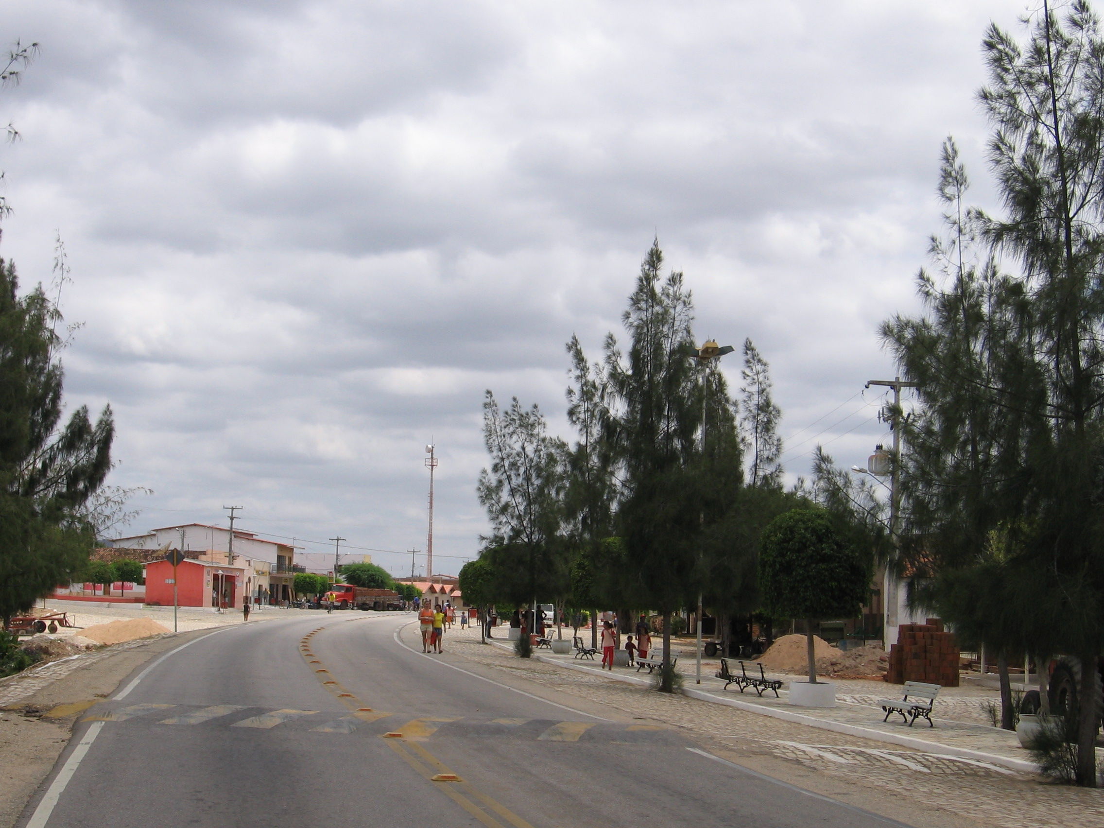 Cidade de Major Sales no Rio Grande do Norte - Brasil.